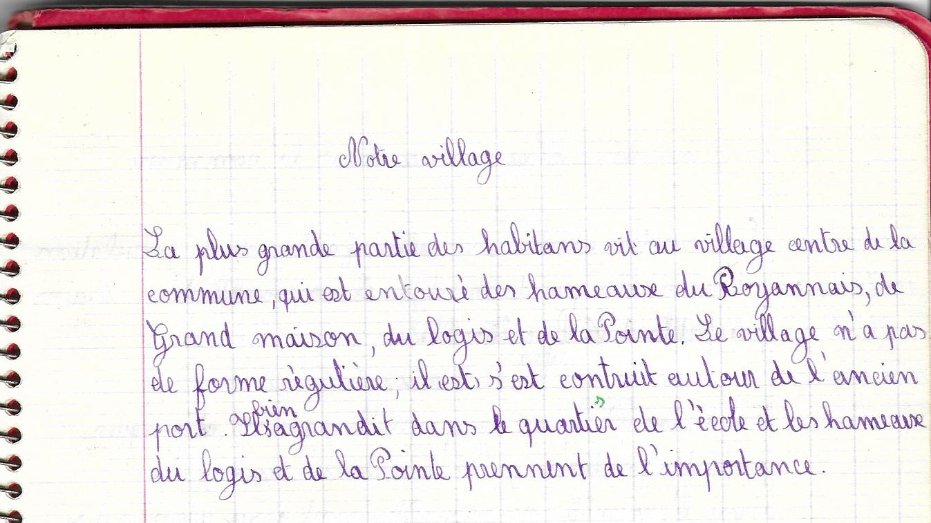 Leçon de géographie locale, jointe au plan du Verdon-sur-mer montrant les hameaux